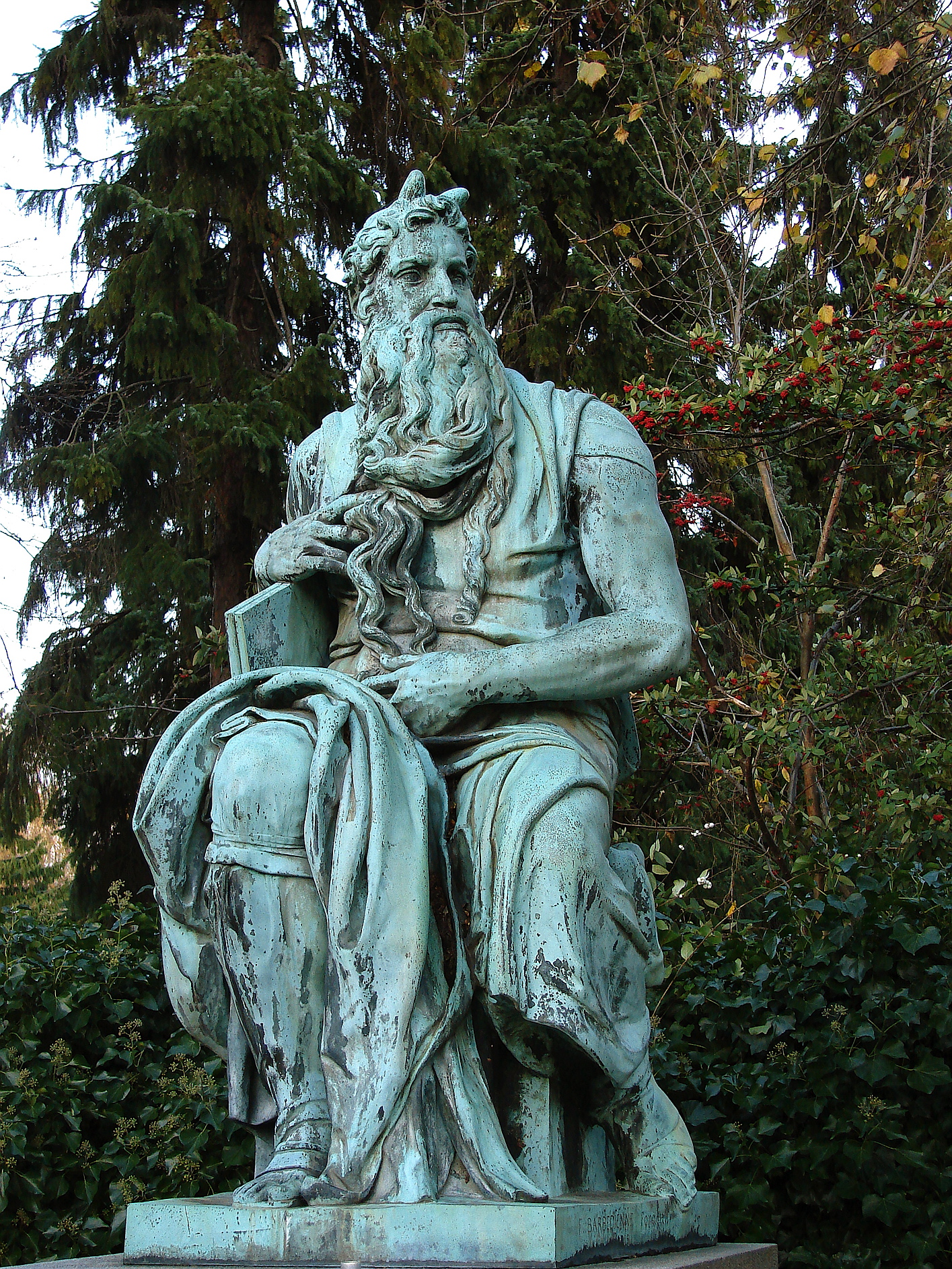 Moses, udført ca. 1515, afstøbning efter original af Michelangelo, opstillet 1925, Hans Tavsens Park, København